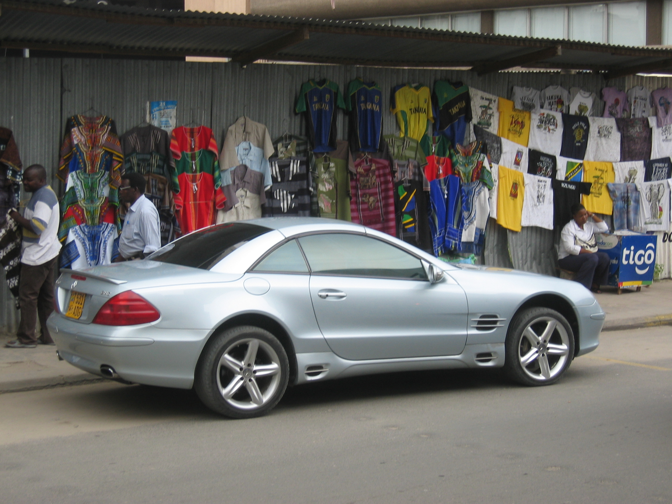 Silver Mercedes-Benz SL Type R230 in Dar es SalaamMercedes-Benz SL